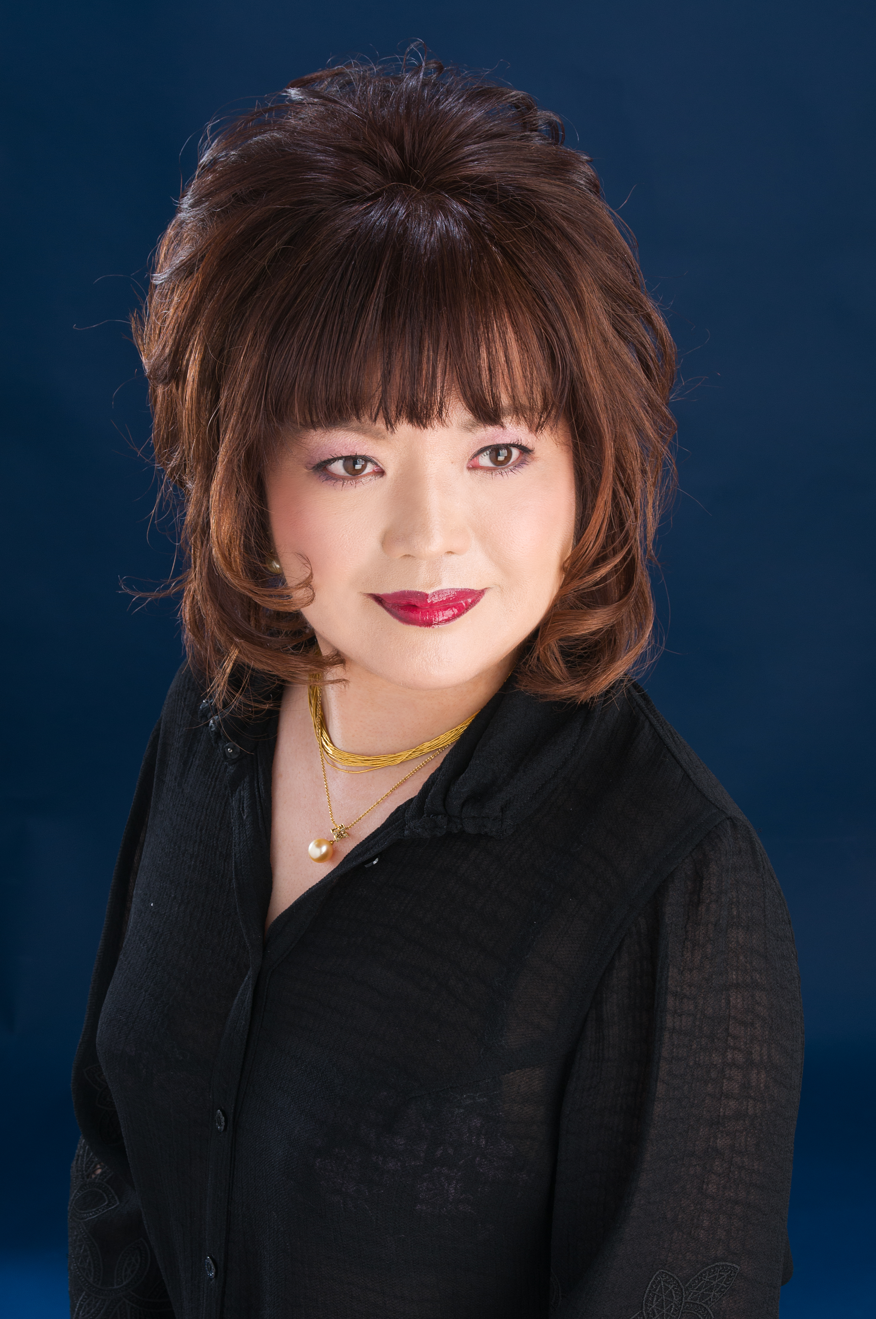 2013年現在の本人写真